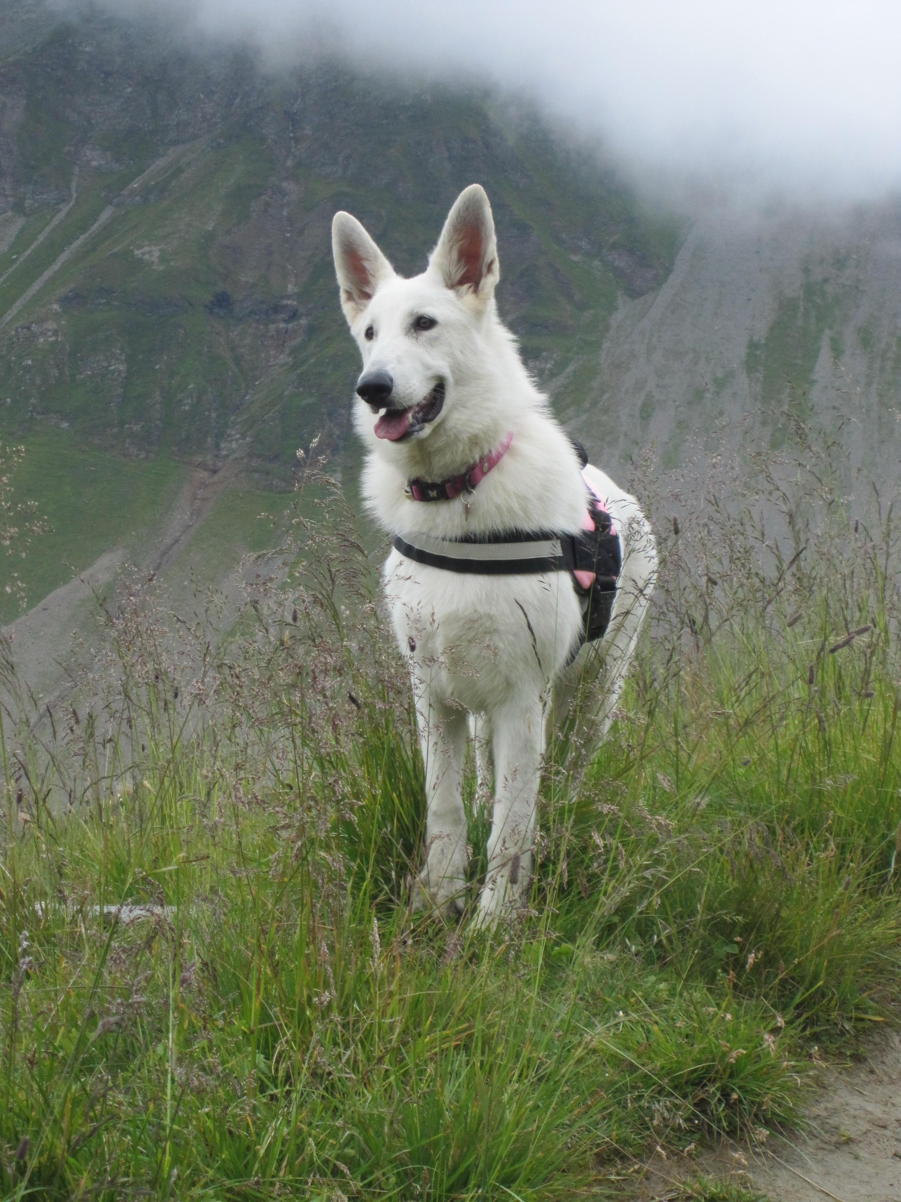 Femelle Berger Blanc Suisse.